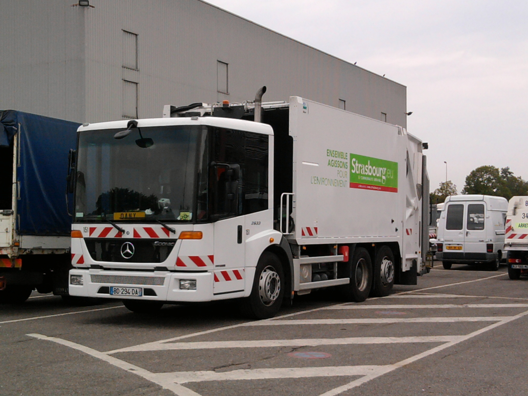 Un camion poubelle Mercedes-Benz Econic de la communauté urbaine de Strasbourg